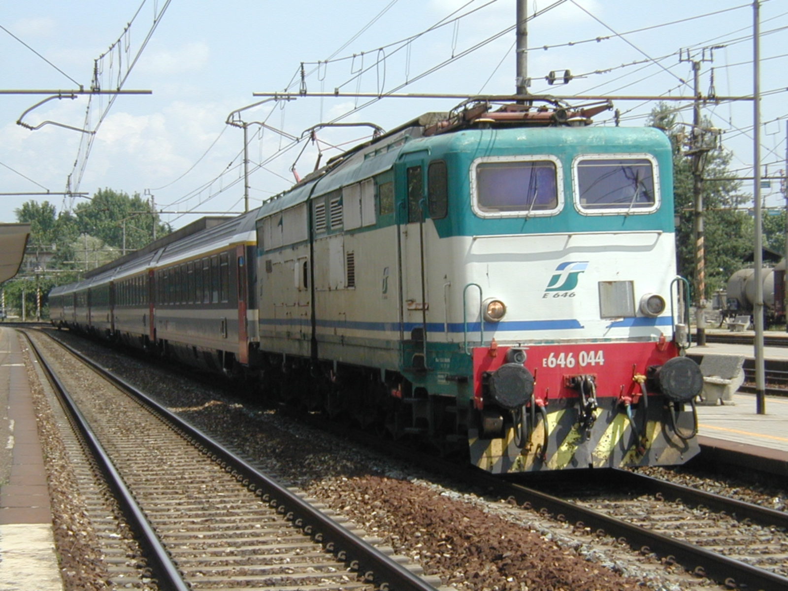 Eurocity von Zürich-HB nach Milano-Centrale durchfahrt Monza